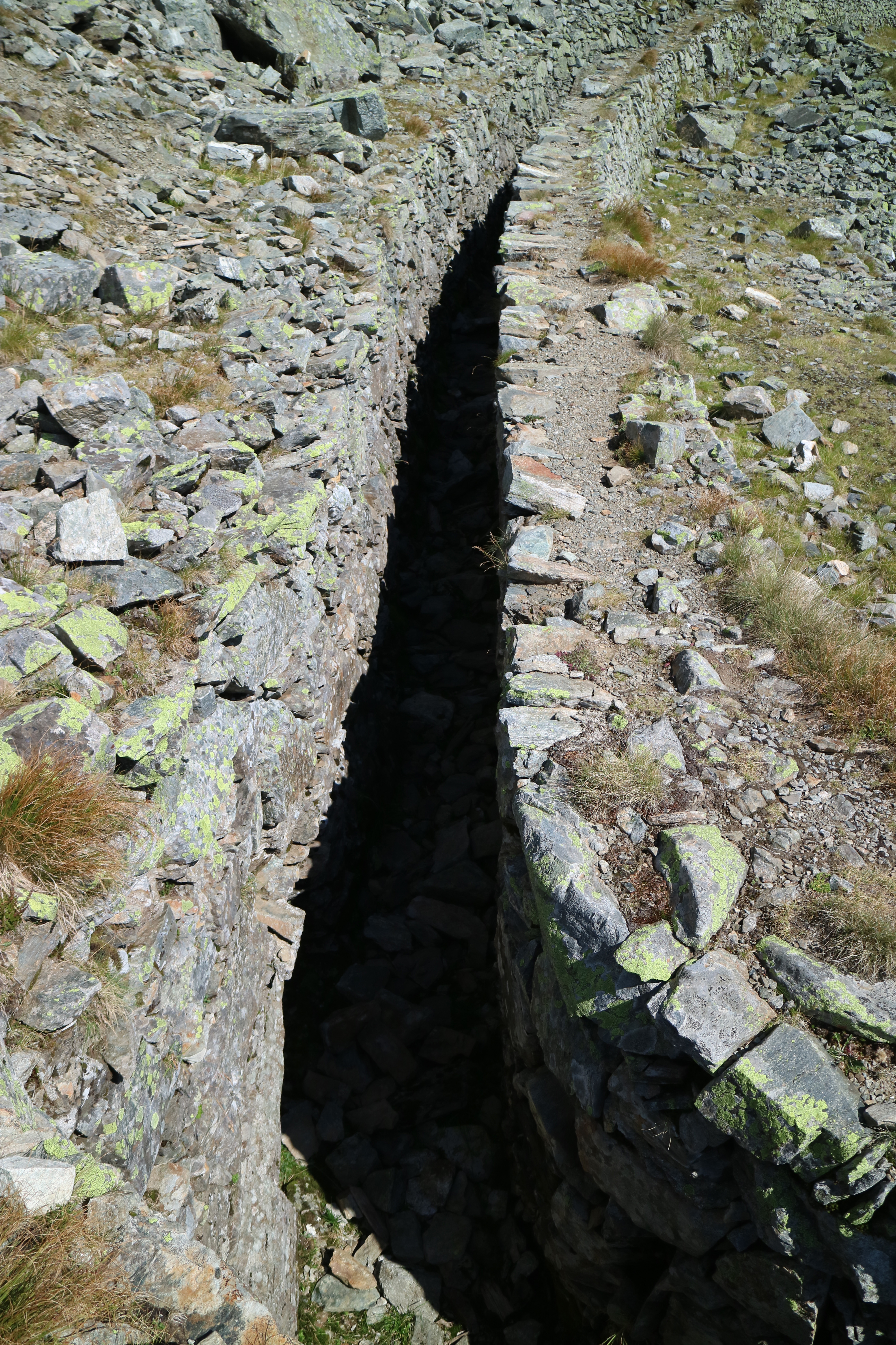 Schneekragen (lawinensicherer Zugang) im Knappenkar am Stollenlehrpfad Zinkwand-Vöttern